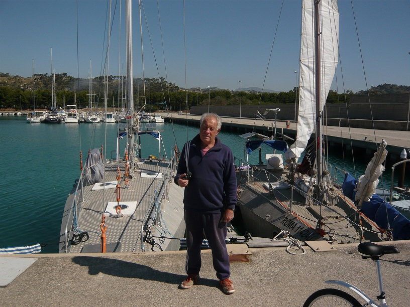 Ernesto Tross tra The White Bear e The Grey Bear ormeggiati di prua (Roccella Jonica 2010)